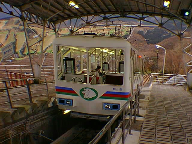 伊豆箱根鉄道、駒ケ岳鋼索線 (通称：駒ケ岳ケーブルカー) の搬器。路線は2005年に廃止された。